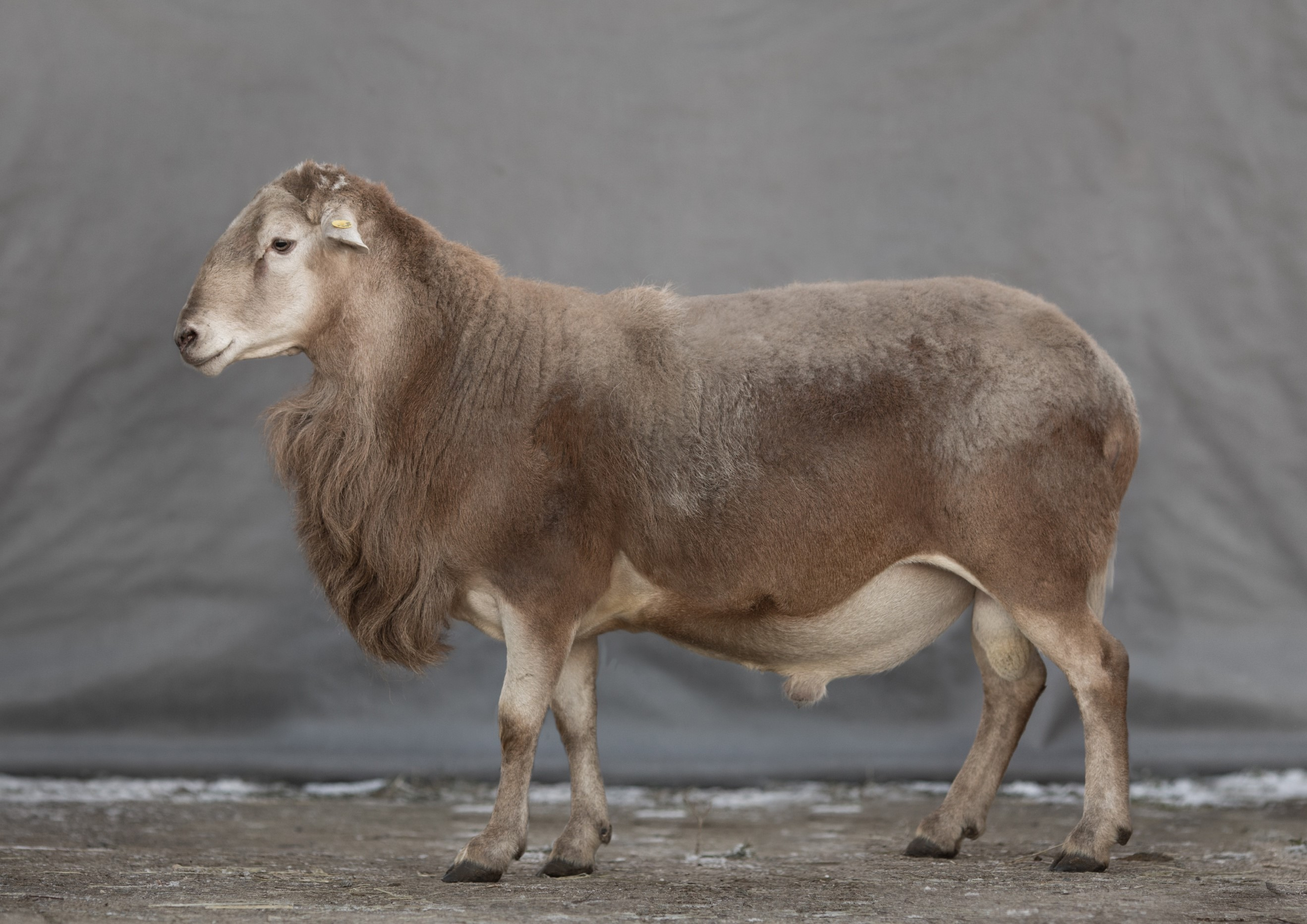 Порода овец – КАТУМСКАЯ (код породы 8261508) – мясная порода овец выведенная в Ленинградской области.